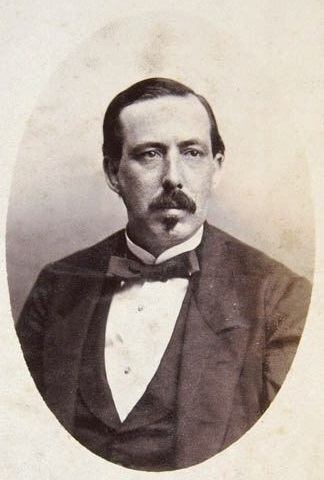 Sr. Ruiz Zorrilla